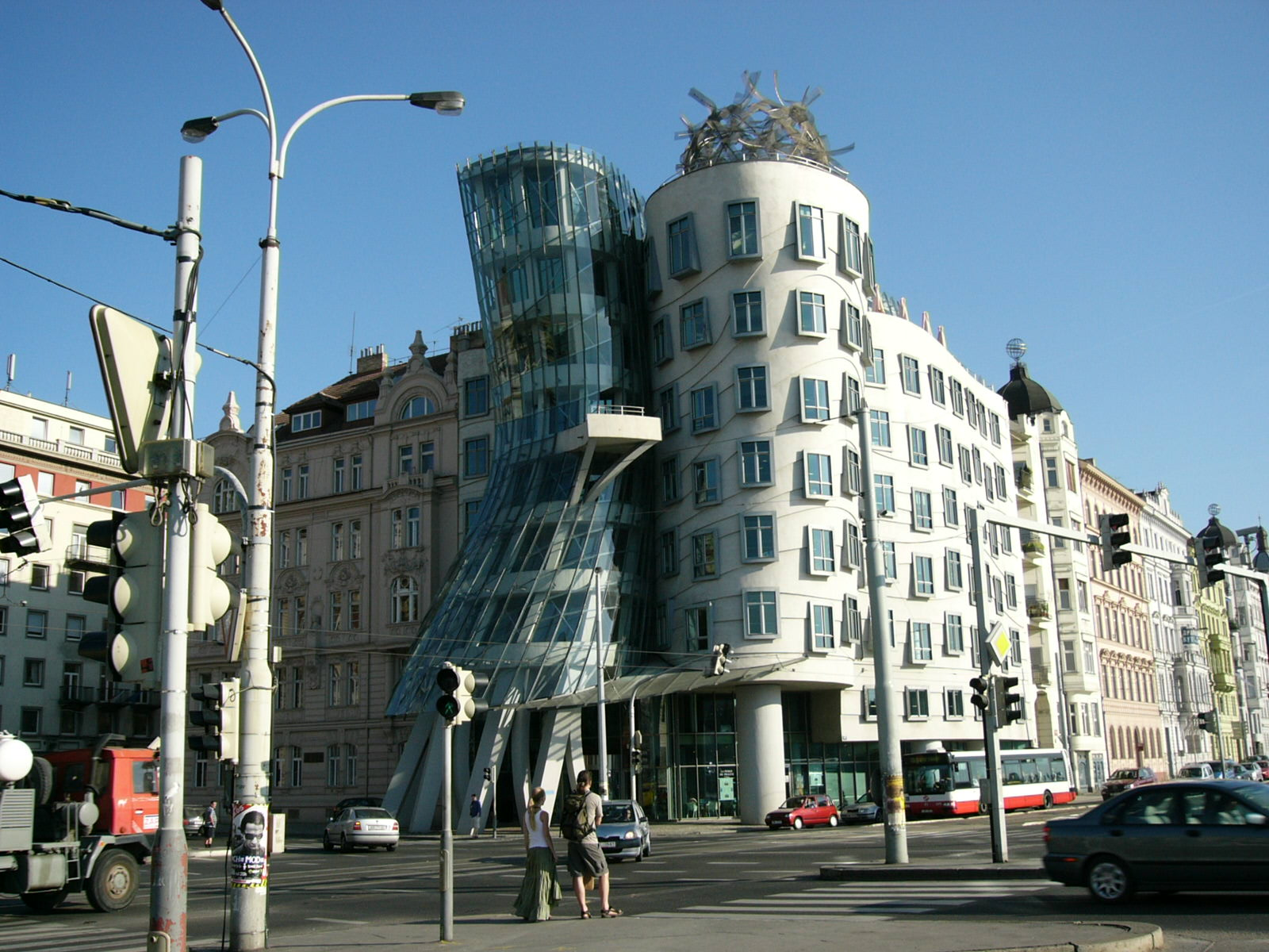 Moder Building, PrahaP1040126